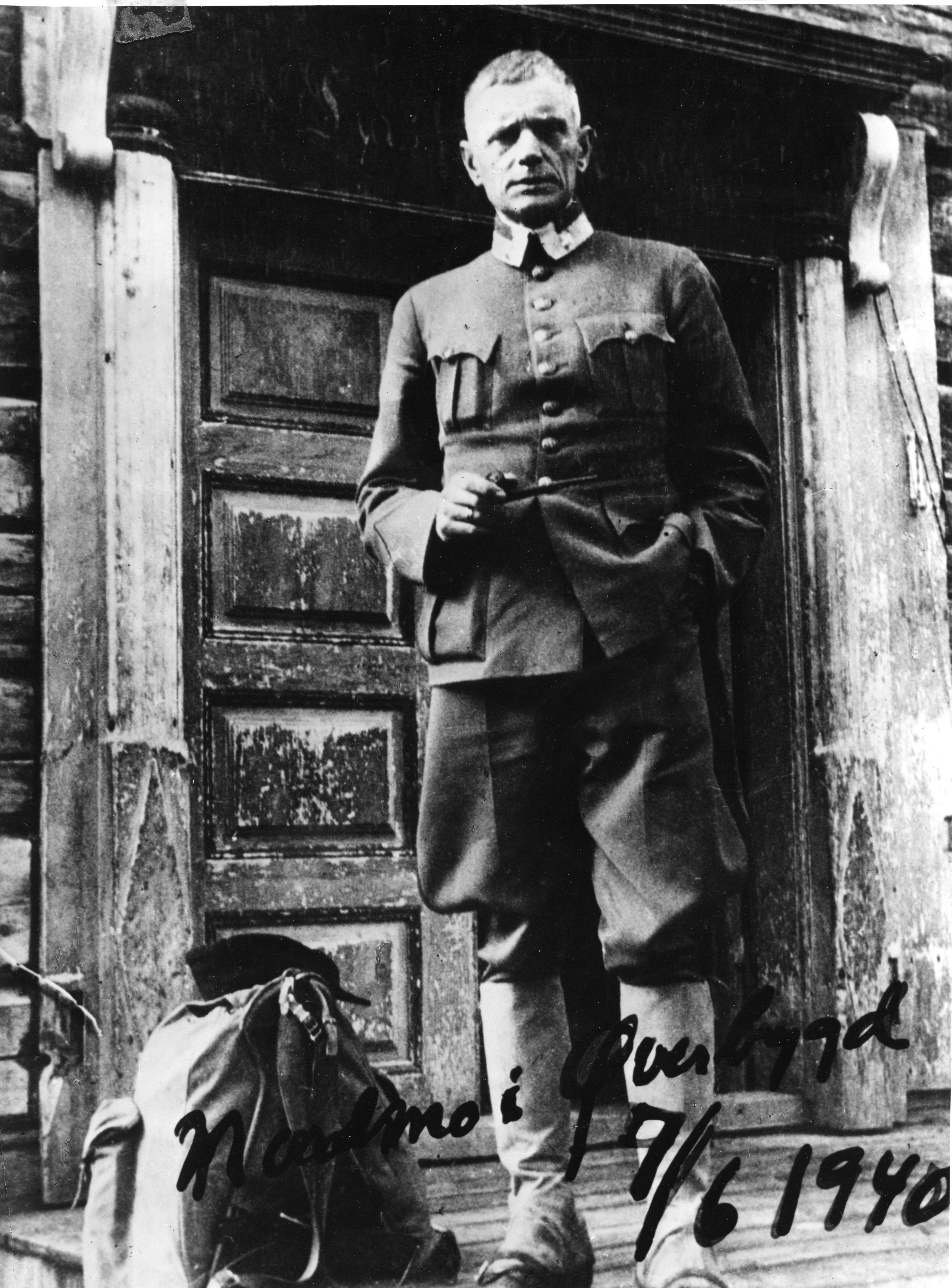 Bildet er hentet fra Arkivverket. General Otto Ruge er avbildet i sin uniform på utsiden av det midlertidige hovedkvarteret for de norske styrkene på gården Nordmo i Øverbygd. Arkivinstitusjon : Riksarkivet Arkivnavn : Forsvaret, Forsvarets krigshistoriske avdeling Sted : NORGE, Troms, Målselv, Emneord: Andre verdenskrig, 2. verdenskrig, Nord-Norge, Militær, Forsvar, Uniform Avbildet: Ruge, Otto